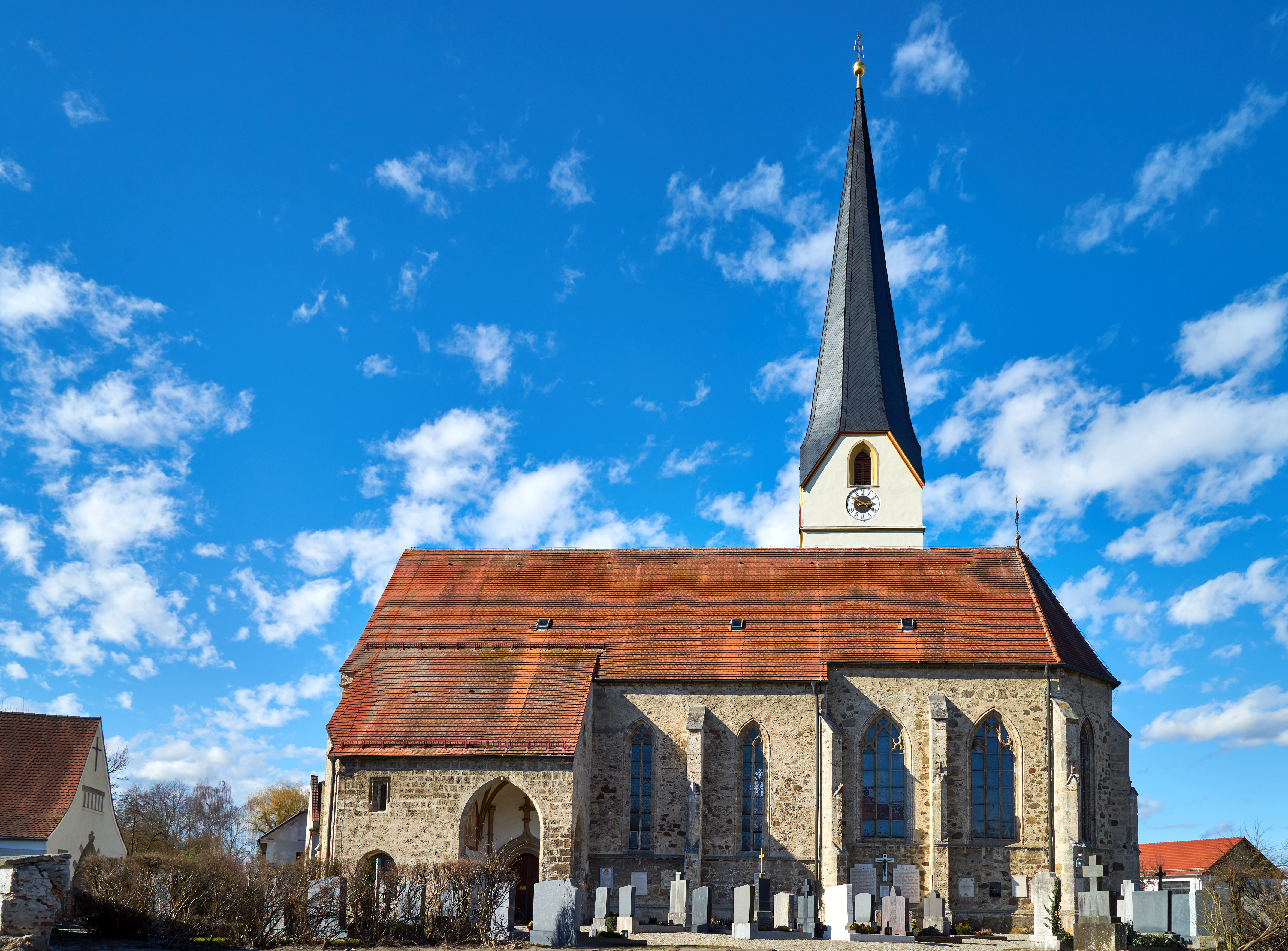 Katholische Pfarrkirche Mariä Himmelfahrt, Saalkirche mit Polygonalchor, Chorflankenturm, zweigeschossiger Sakristei und offener Vorhalle, spätgotisch, spätes 15. Jahrhundert (bezeichnet 1461), am Langhaus Hochwassermarke des Passauer Typs von 1501; mit Ausstattung; Friedhofsmauer aus Tuffstein, wohl 16./17. Jahrhundert.